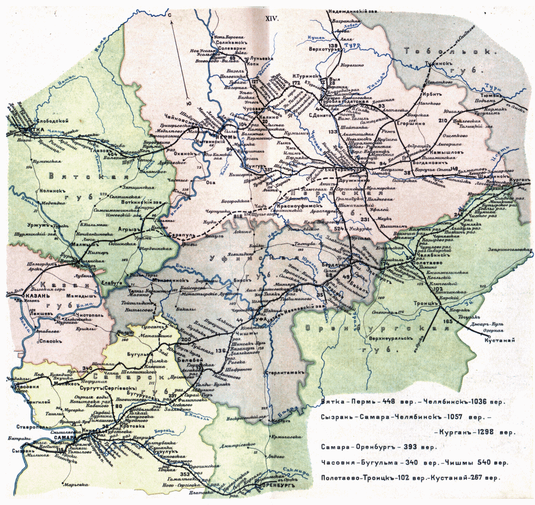 Пермская, Самаро-Златоустовская, Троицкая, Волго-Бугульминская, Западно-Уральская, Северно-Восточно-Уральская, Богословская, Московско-Казанская, Омская, Ташкентская, Северная ж/д.